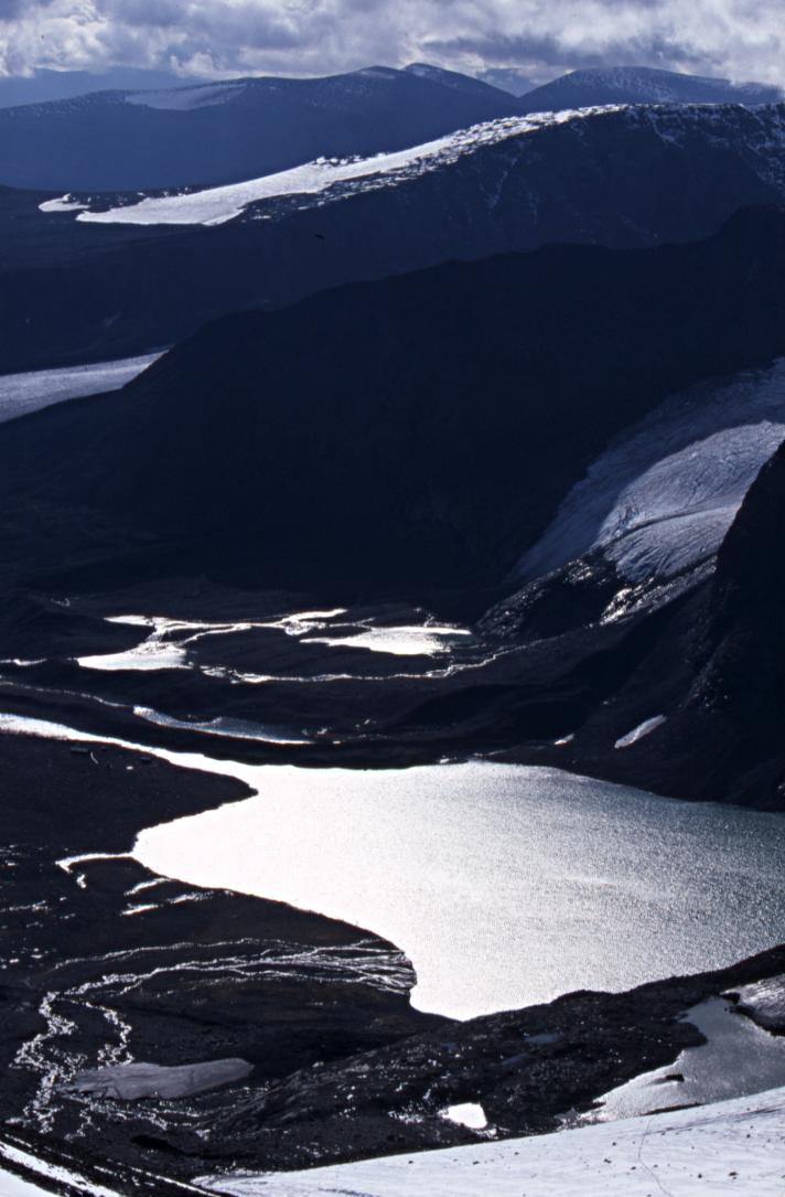 Tarfalavagge upper part with Tarfalajaure, photographed from Tarfalatjåkka.